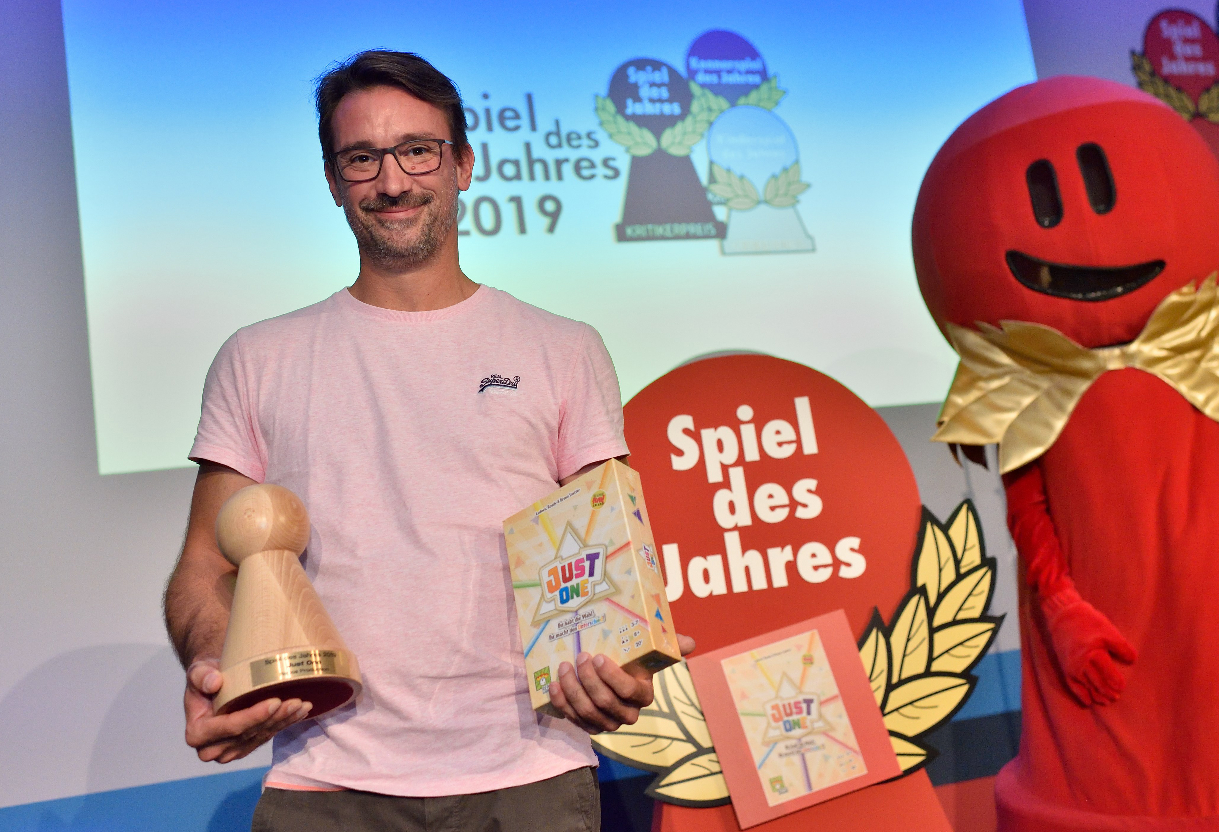 Spiel des Jahres 2019 Auszeichnung für Just One.